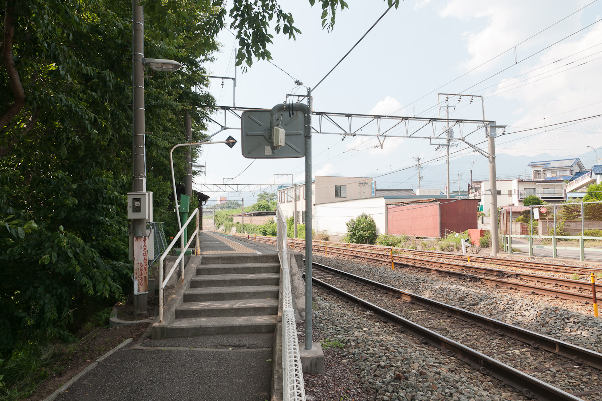 JR東日本小海線東小諸駅。